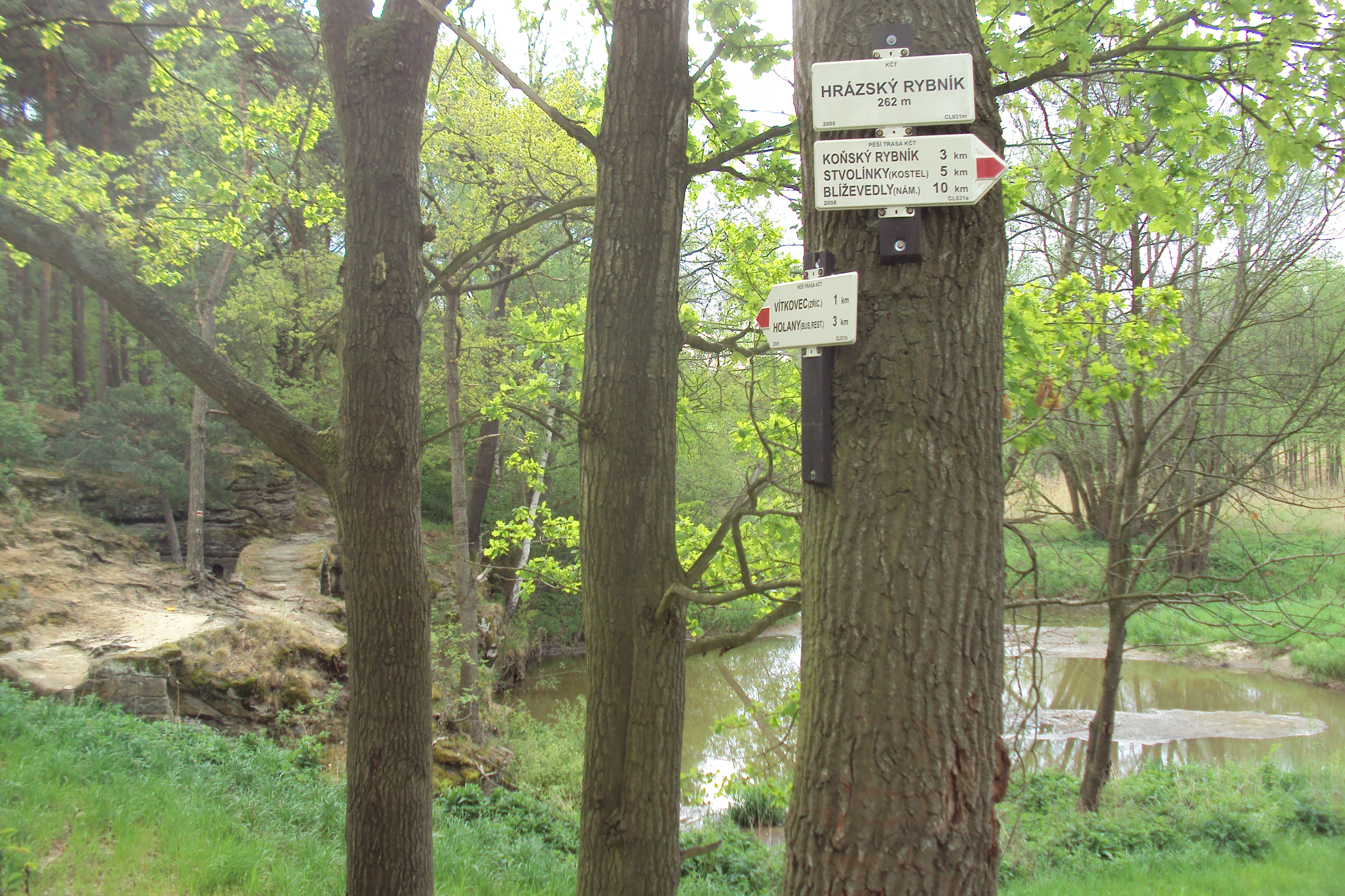 Ukazatel na hrázi Hrázského rybníka